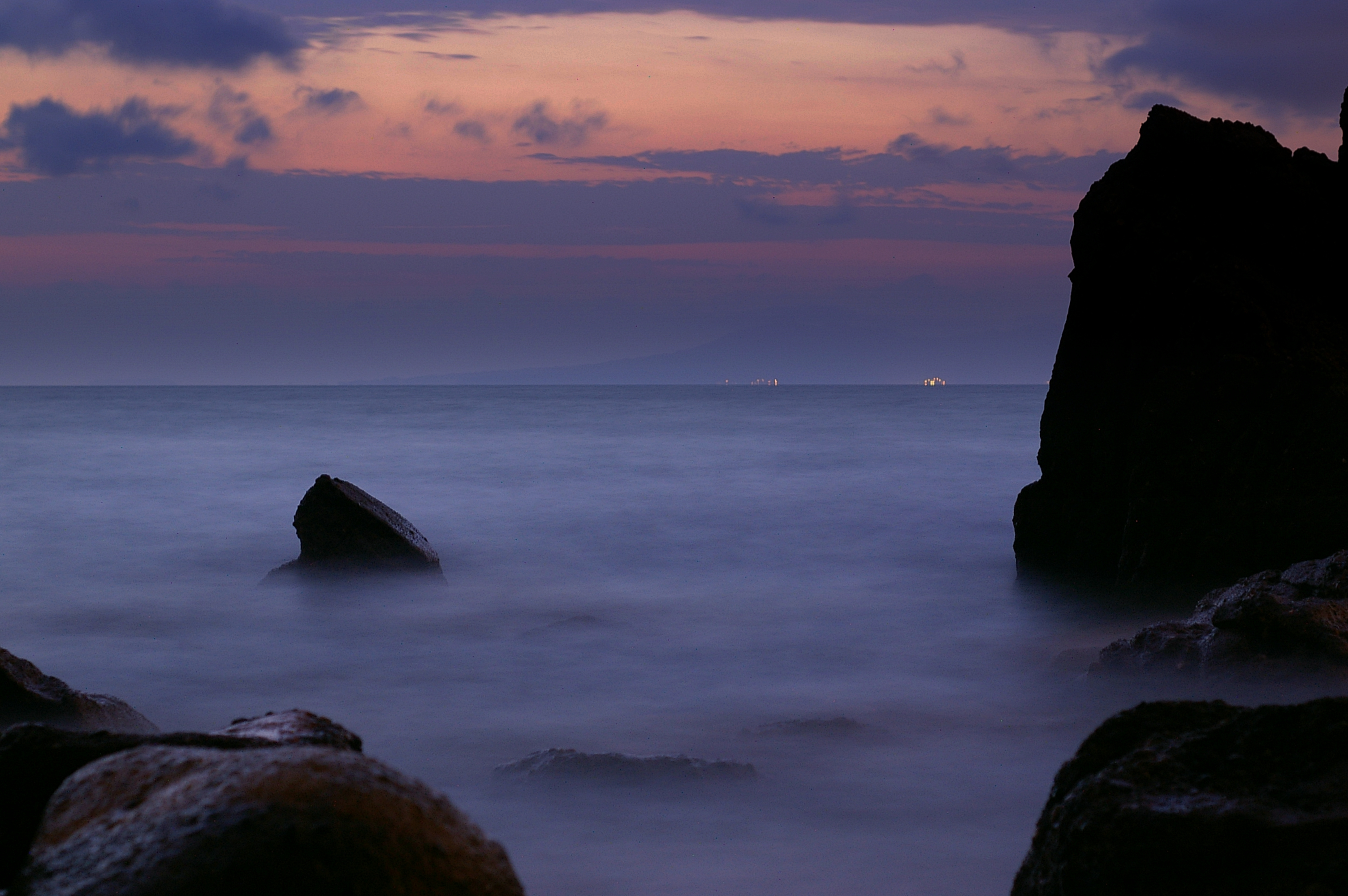 30 second exposure